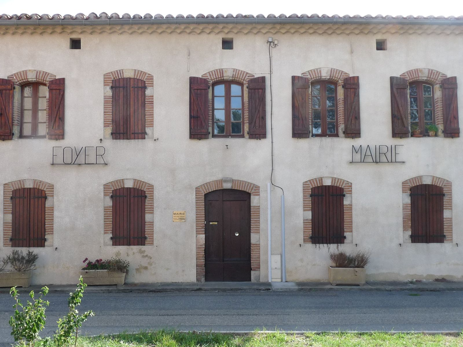 Mairie de Montclar-Lauragais, Haute-Garonne, France